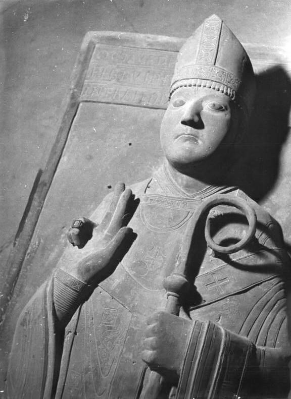 Zentralbild-Biscan Wjt-Ho. 7 Motive 19.9.1955 Der Dom zu Magdeburg zur Nutzung freigegeben Der in jahrelanger Arbeit wiederhergestellte Dom zu Magdeburg ist am 15.9. von der Baupolizei abgenommen und zur Nutzung freigegeben worden. Die feierliche Eröffnung des Doms ist für 22. September geplant und soll gleichzeitig mit der Einführung des neuen Bischofs Jänicke vorgenommen werden. Die Wiederherstellung des knapp vor Kriegsende von amerikanischen Bomben schwer zerstörten Doms hat über eine Million DM gekostet und wurde ausschliesslich aus den Staatsmitteln bestritten. Auch nach der Freigabe zur Nutzung sind viele kleinere Kriegsschäden zu beheben. UBz, Ausschnitt aus der Bronze-Grabplatte des Erzbischofs Friedrich von Wettin. Diese Grabplatte ist von besonderem Wert, weil sie eines der wenigen Stücke ist, die noch aus dem ersten Dom (der 1207 niederbrannte) erhalten blieb. Die Platte stammt aus der Magdeburger Giesserwerkstatt Requinus, die auch die Erztüren für die Kathedrale zu Nowgorod geliefert hat.